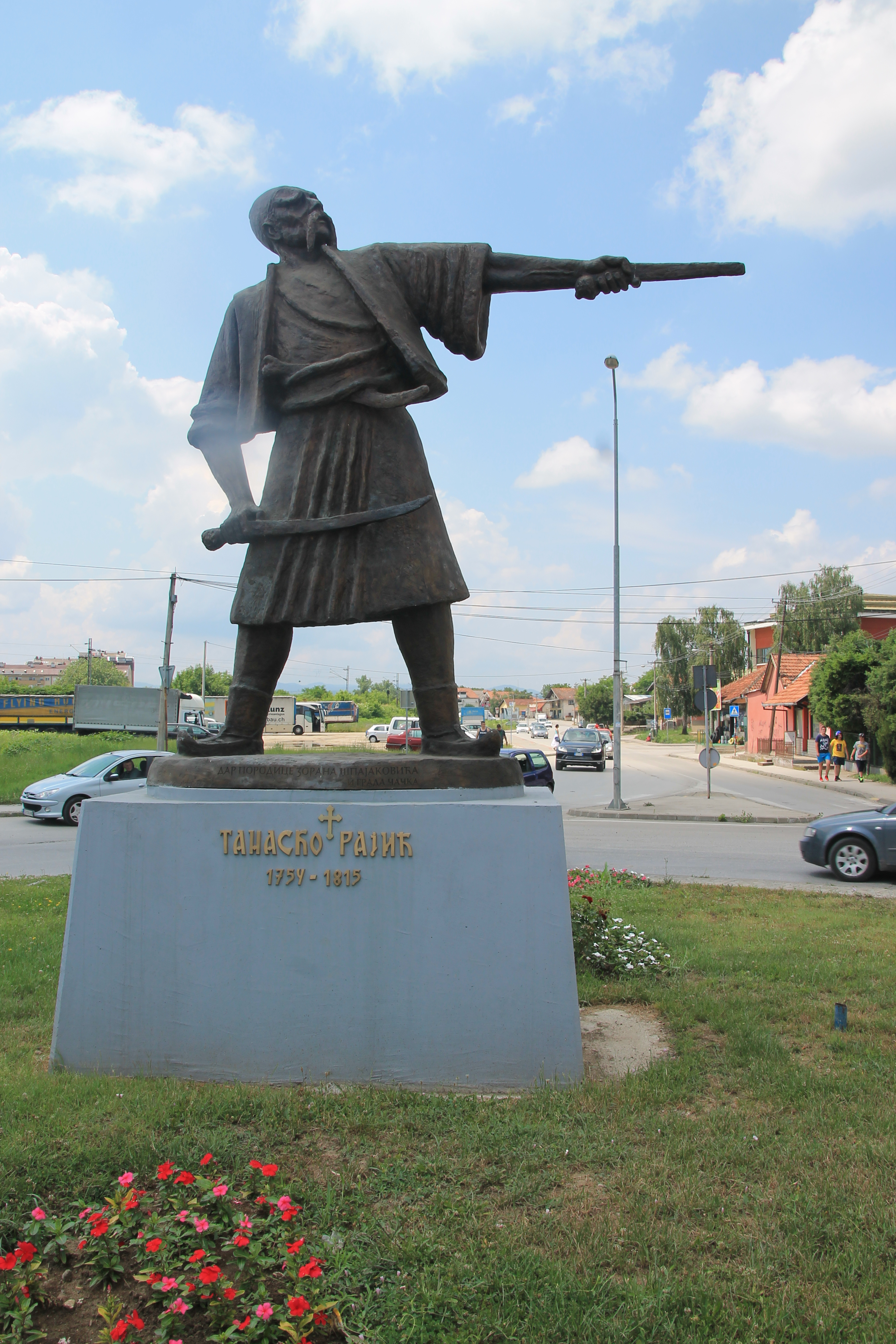 Spomenik Tanasku Rajiću u Čačku